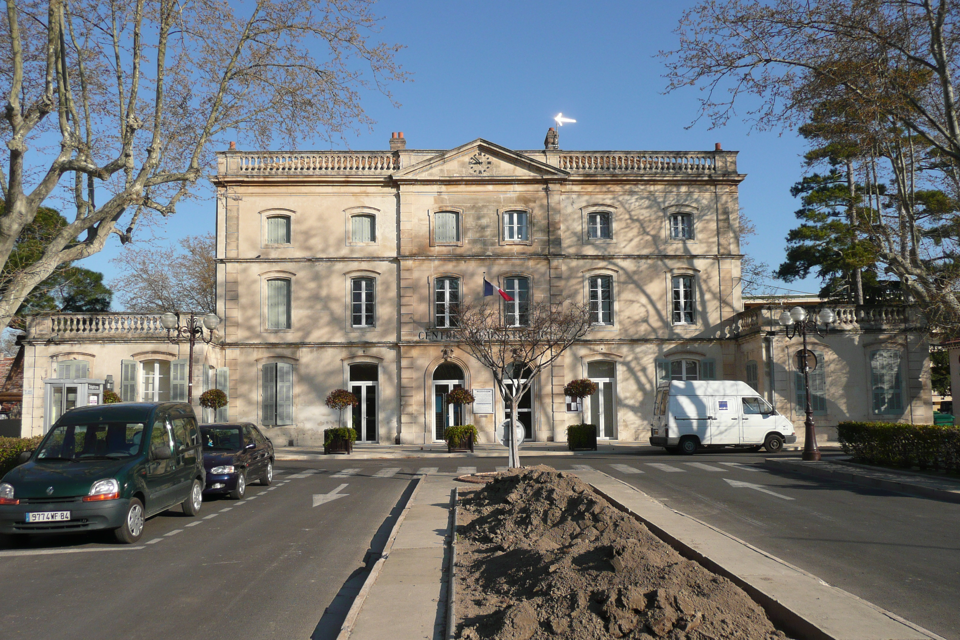 Montfavet.